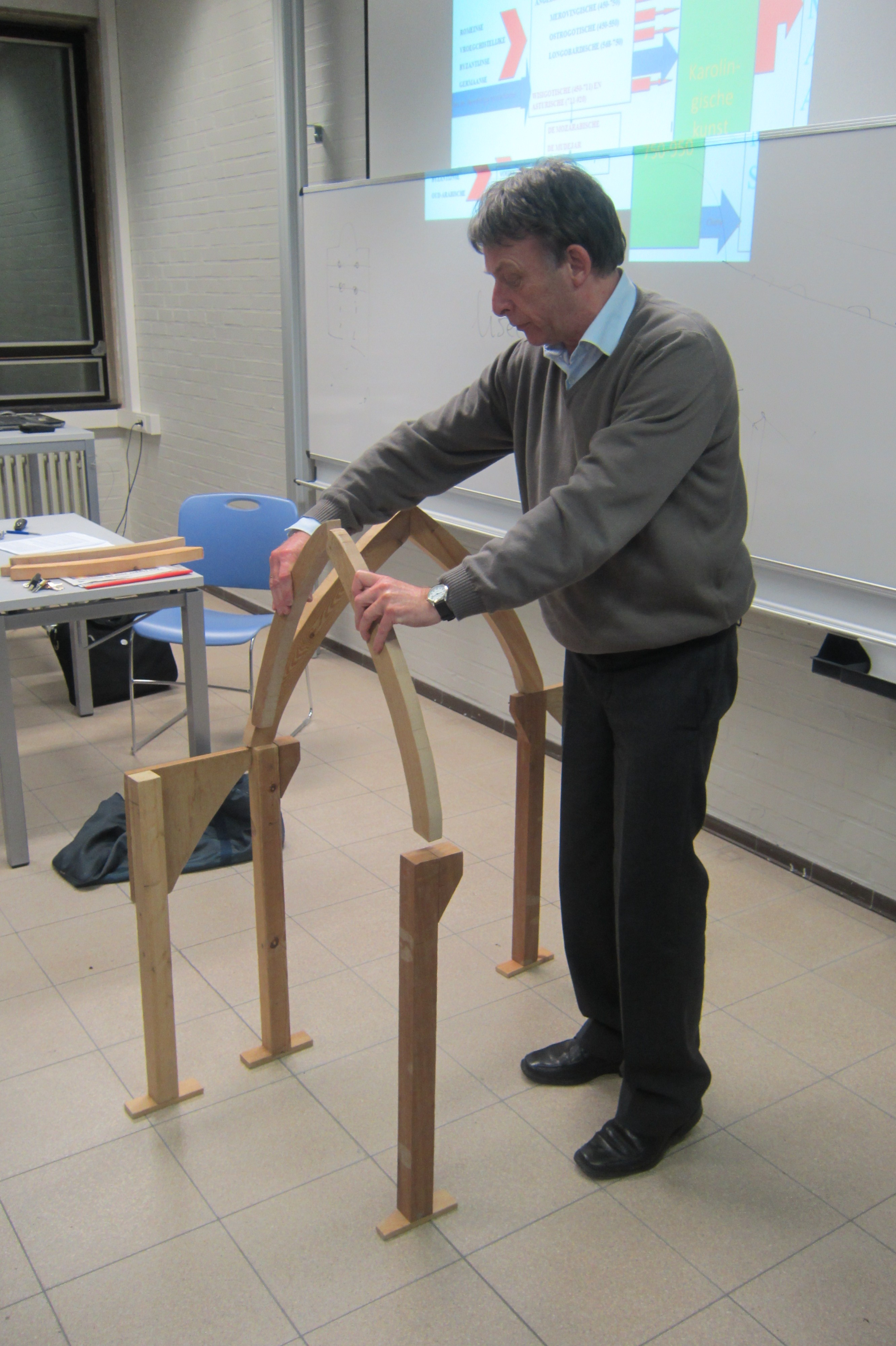 Constructieprincipe van de Gotiek gedemonstreerd door Dr. Jan Vaes